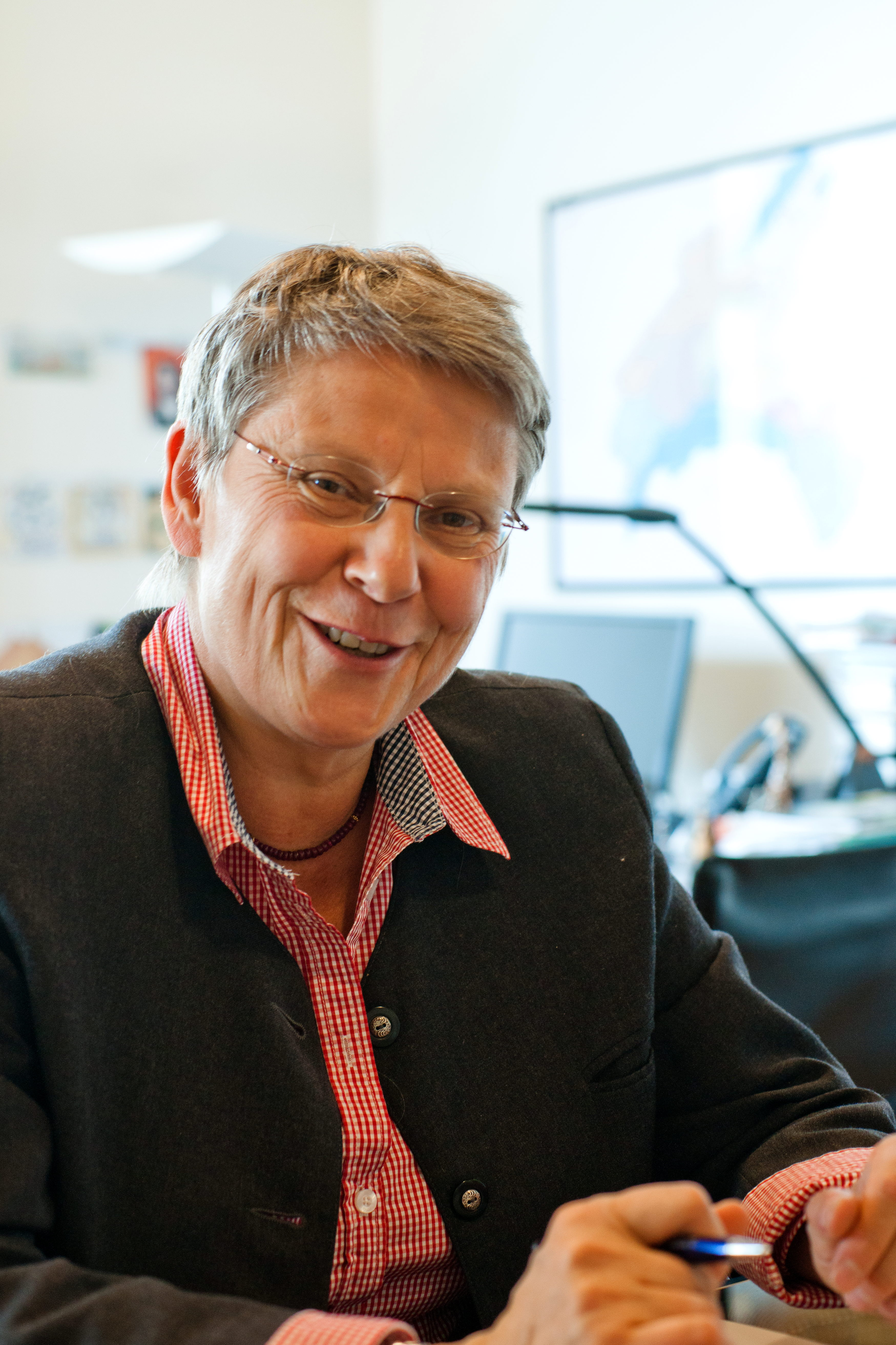 Béatrice Métraux, Conseillère d'Etat du canton de Vaud. Ici en 2012.